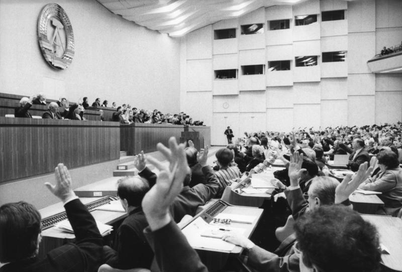 ADN-ZB / Settnik / 20.2.1990 / Berlin: Volkskammer-Tagung 26 Tage vor den ersten freien und demokratischen Wahlen in der DDR verabschiedete die Volkskammer in 2. Lesung das Gesetz über die Wahlen zur Volkskammer am 18. März und die Wahlordnung.